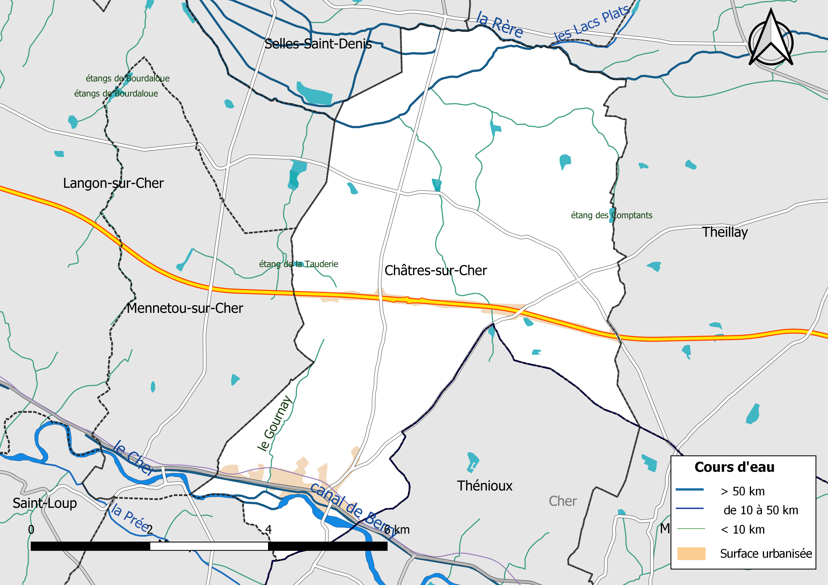 Carte du réseau hydrographique de la commune de Châtres-sur-Cher (Loir-et-Cher, France).